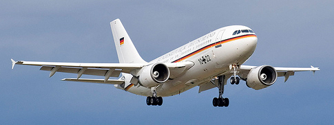 Airbus A310-304 VIP 10+22 „Theodor Heuss“ der Flugbereitschaft Bundesministerium der Verteidigung (Deutschland)